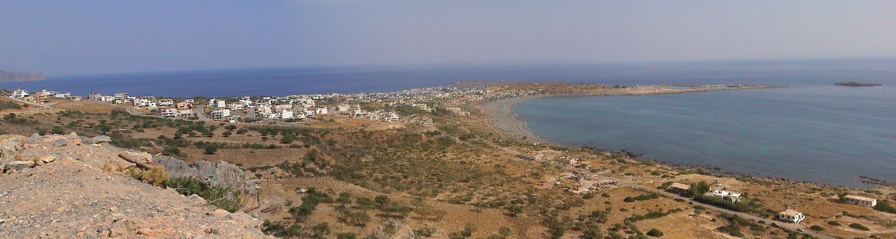 Paleochora, Kreta. Oversiktsbilde.